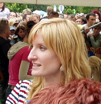 Adela Banášová, Slovak femcee at the Open Doors Day for TV Markiza – Slovakia